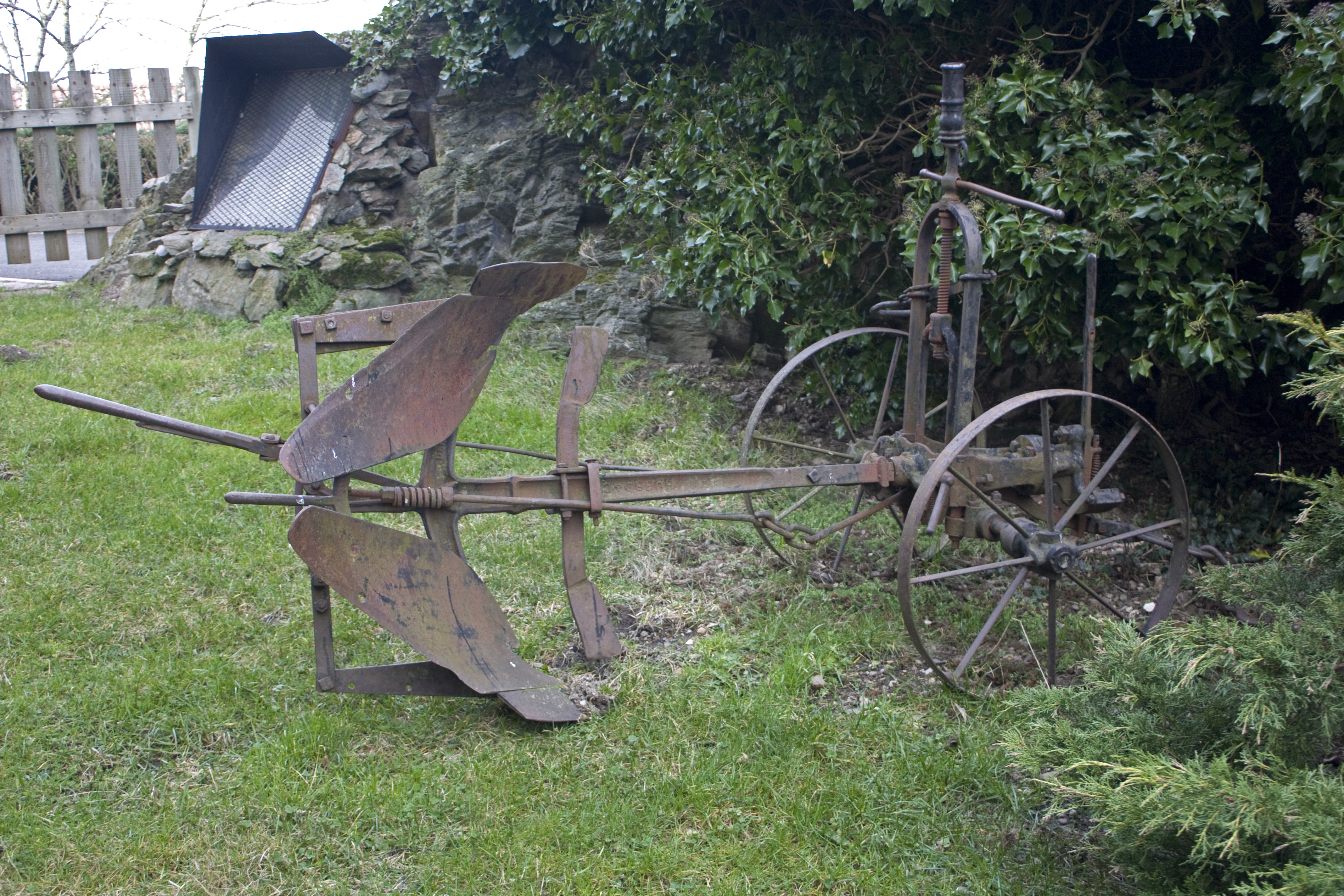 charrue, double-brabant, début du 20° siècle.